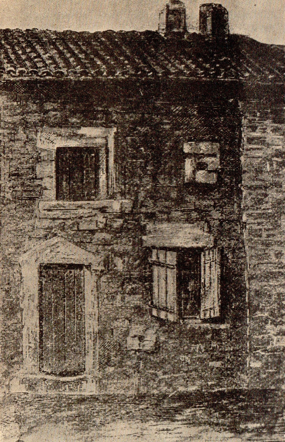 Dom urodzenia Jeana Mabillona w Saint-Pierremont.